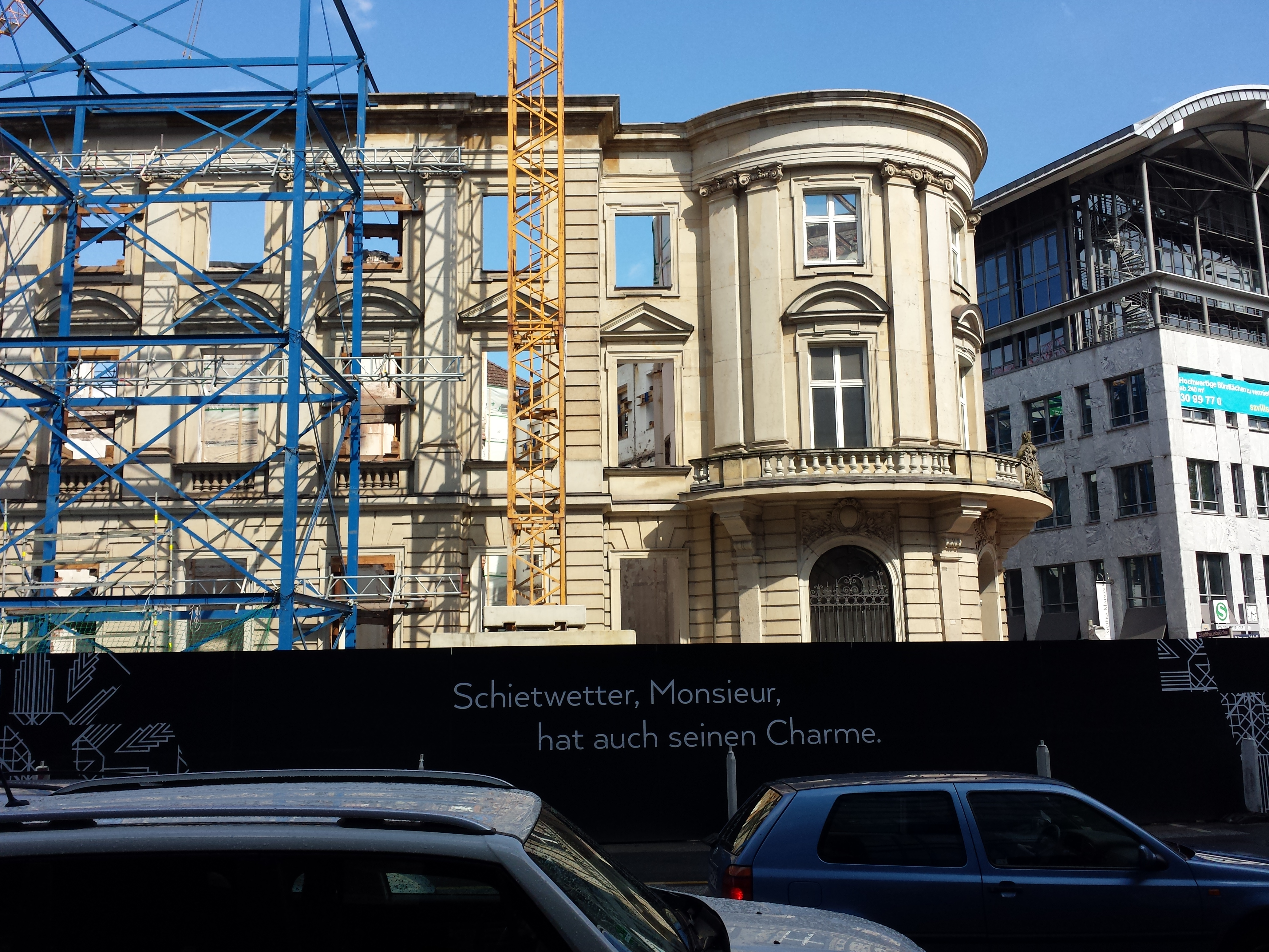 Das entkernte Stadthaus in Hamburg während des Umbaus 2015